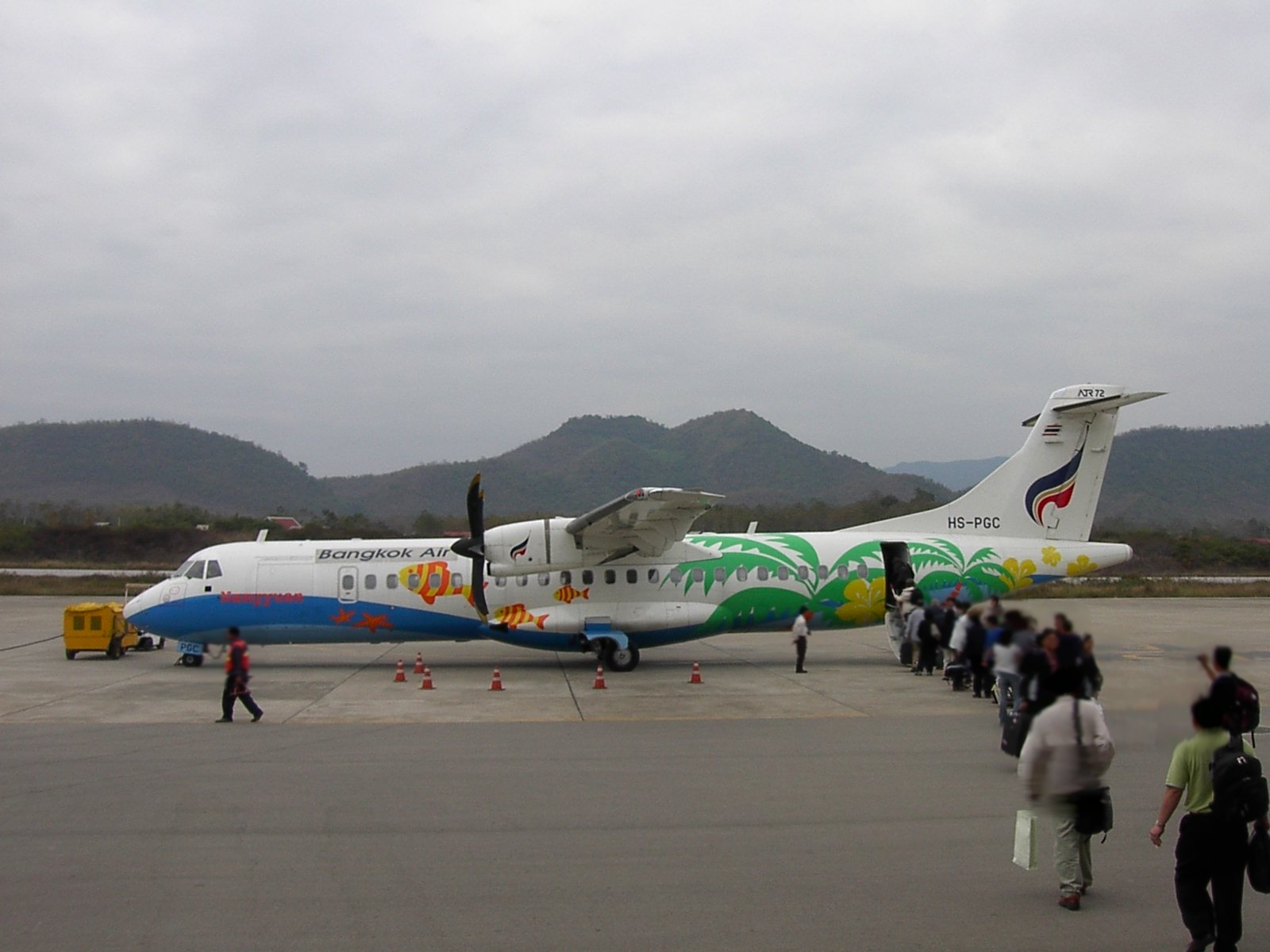 Bangkok Airways ATR 72-500